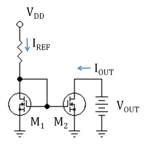 Simple MOSFET mirror